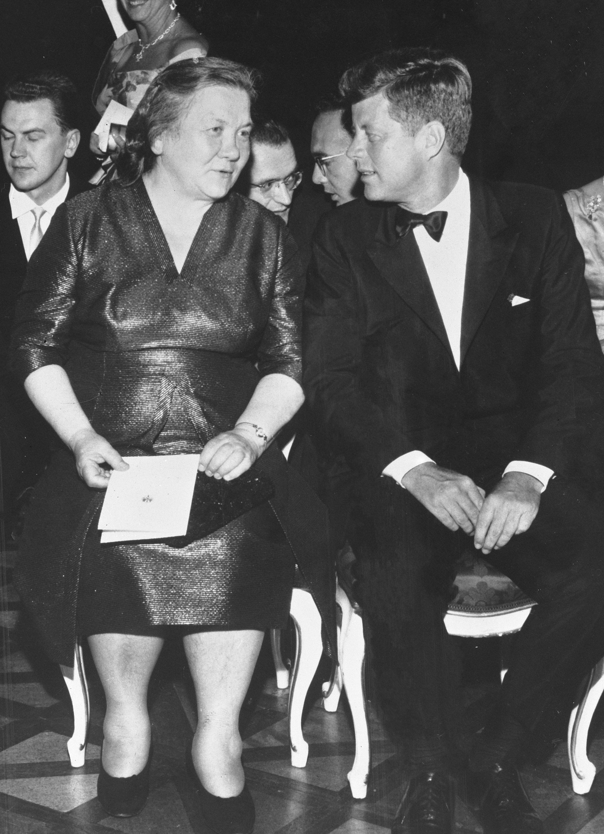 President Kennedy en Nina Chroestjev